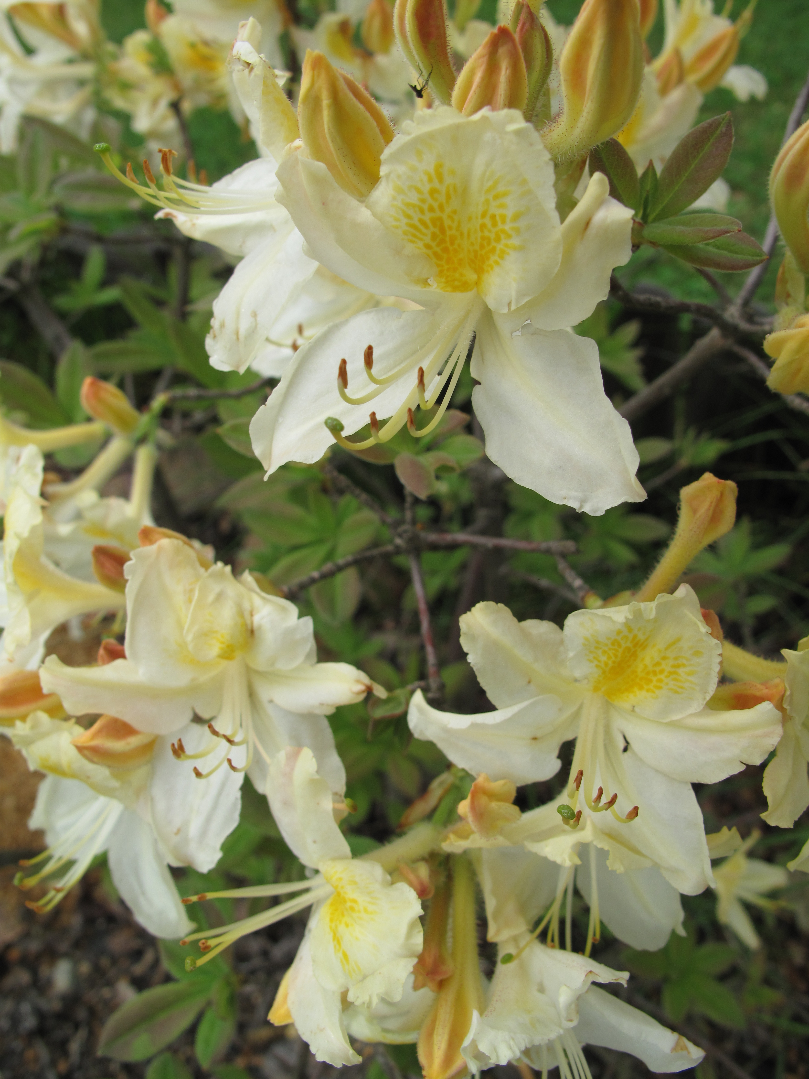 květy